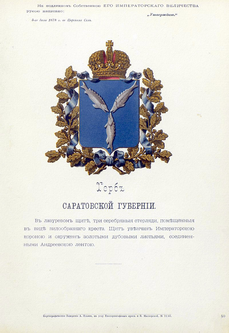 Official Russian Empire coat of arms Saratov Governorate. Герб Российской Империи Саратовской губернии с официальным описанием в Гербовнике Бенке. Утверждён Императором Всероссийским Александром Вторым.